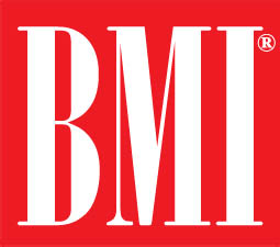 Logótipo da organização norte-americana Broadcast Music Incorporated.